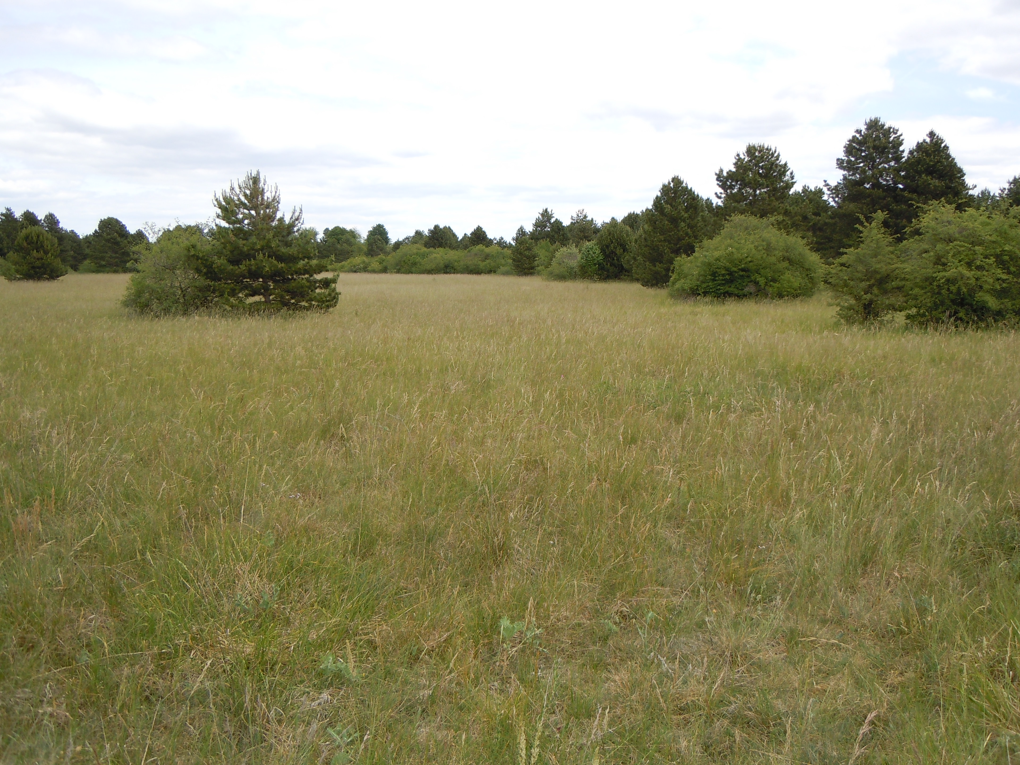 Parc de la Motte Giron - pelouse de type Mésobromion - Dijon - Côte-d'Or - France